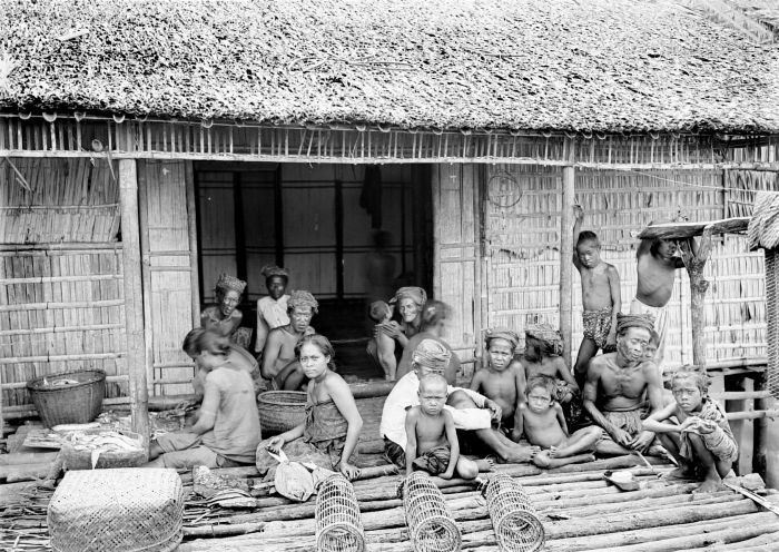 Negatief. Vissersfamilie, Java's Zuidkust